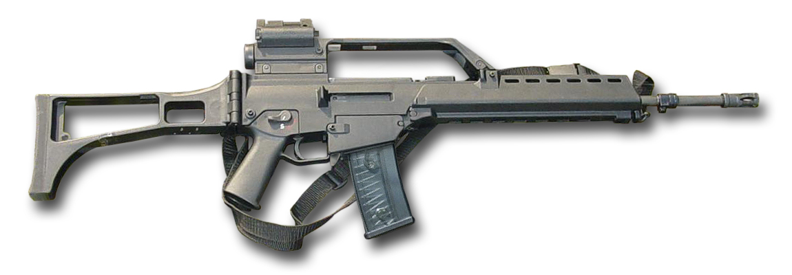 Gewehr G36 mit Magazin